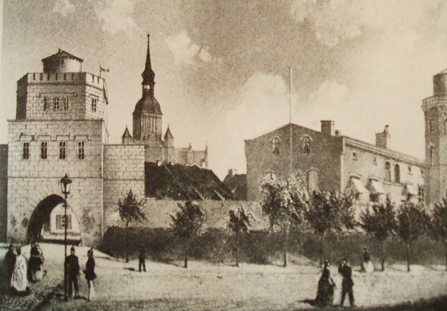 Das Bild zeigt eine Lithographie des Künstlers Robert Geissler, um 1855 (11,5x7,5cm). Dargestellt sind das Tribseer Innentor und die Navigationsschule. Dieses Foto wurde aus dem Buch "Geschichte der Stadt Stralsund" von Herbert Ewe, S. 255, abfotografiert.